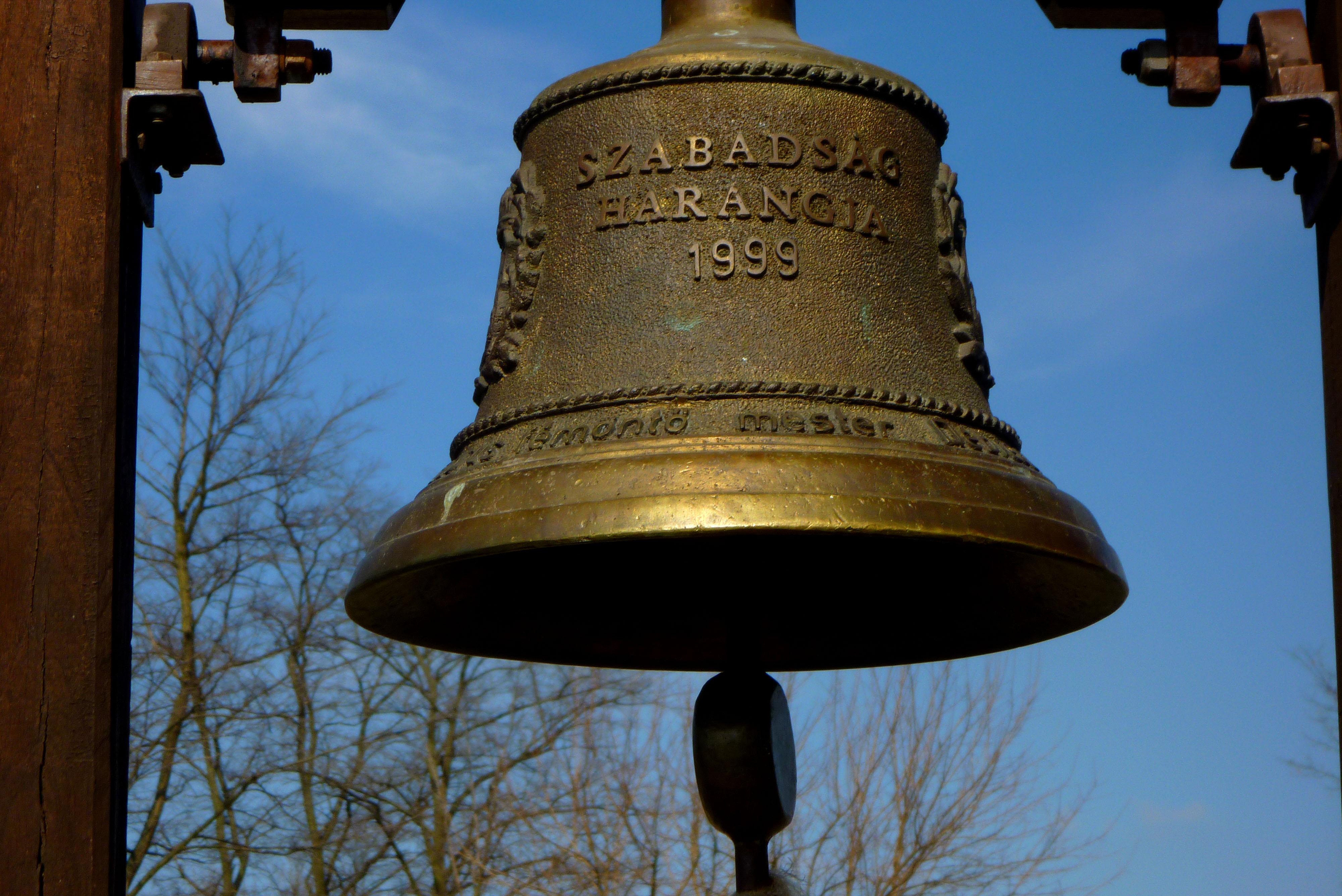 Paneurópai Piknik Emlékharang